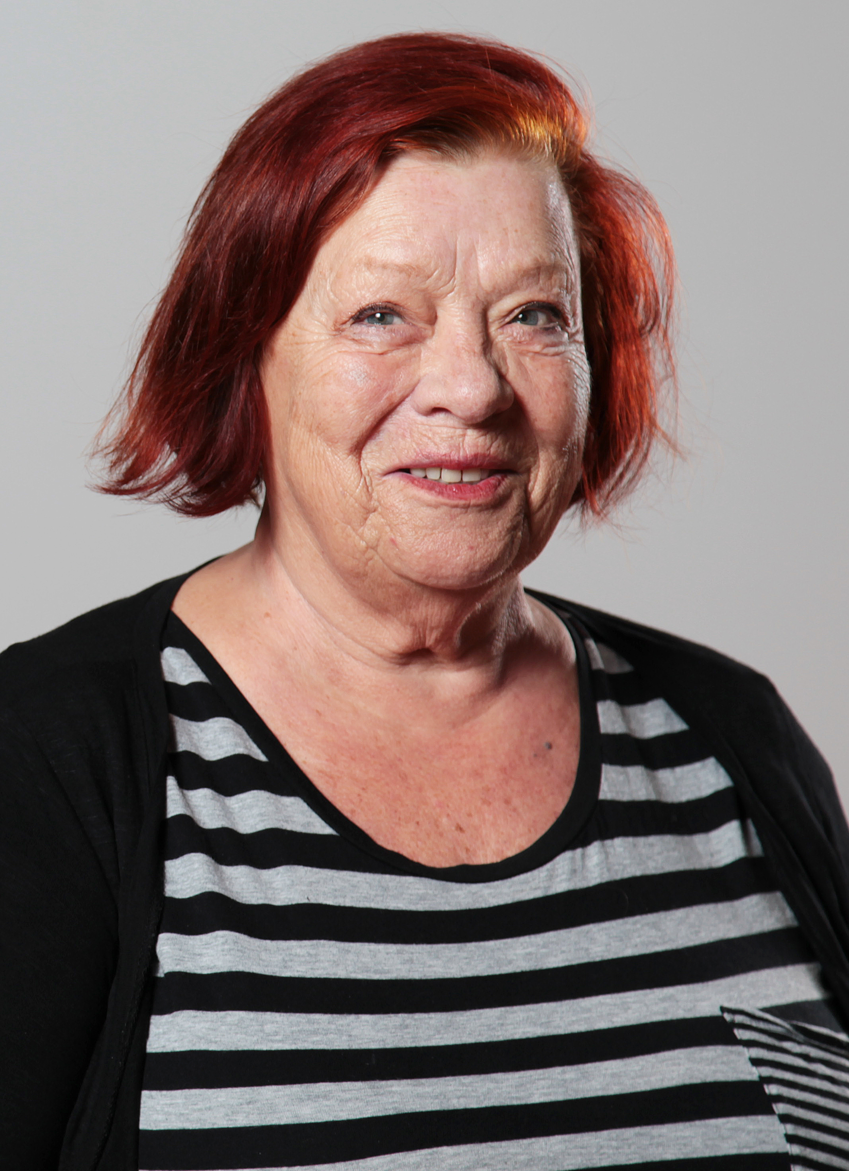 Skådespelaren Inga Ålenius